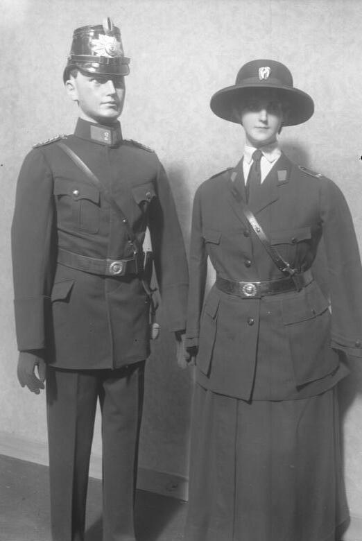 Eröffnung der grossen internationalen Polizeiausstellung in Berlin! wurde am 25. September 1926 durch den preussischen Innenminister Severing eröffnet. Die Ausstellung ist die grösste dieser Art in der Welt. Zur geplanten Einführung der weiblichen Polizei. rechts: eine Uniform für die geplante Einführung der weiblichen Polizei. links: der vorschriftsmässige Anzug eines Schutzpolizeibeamten.